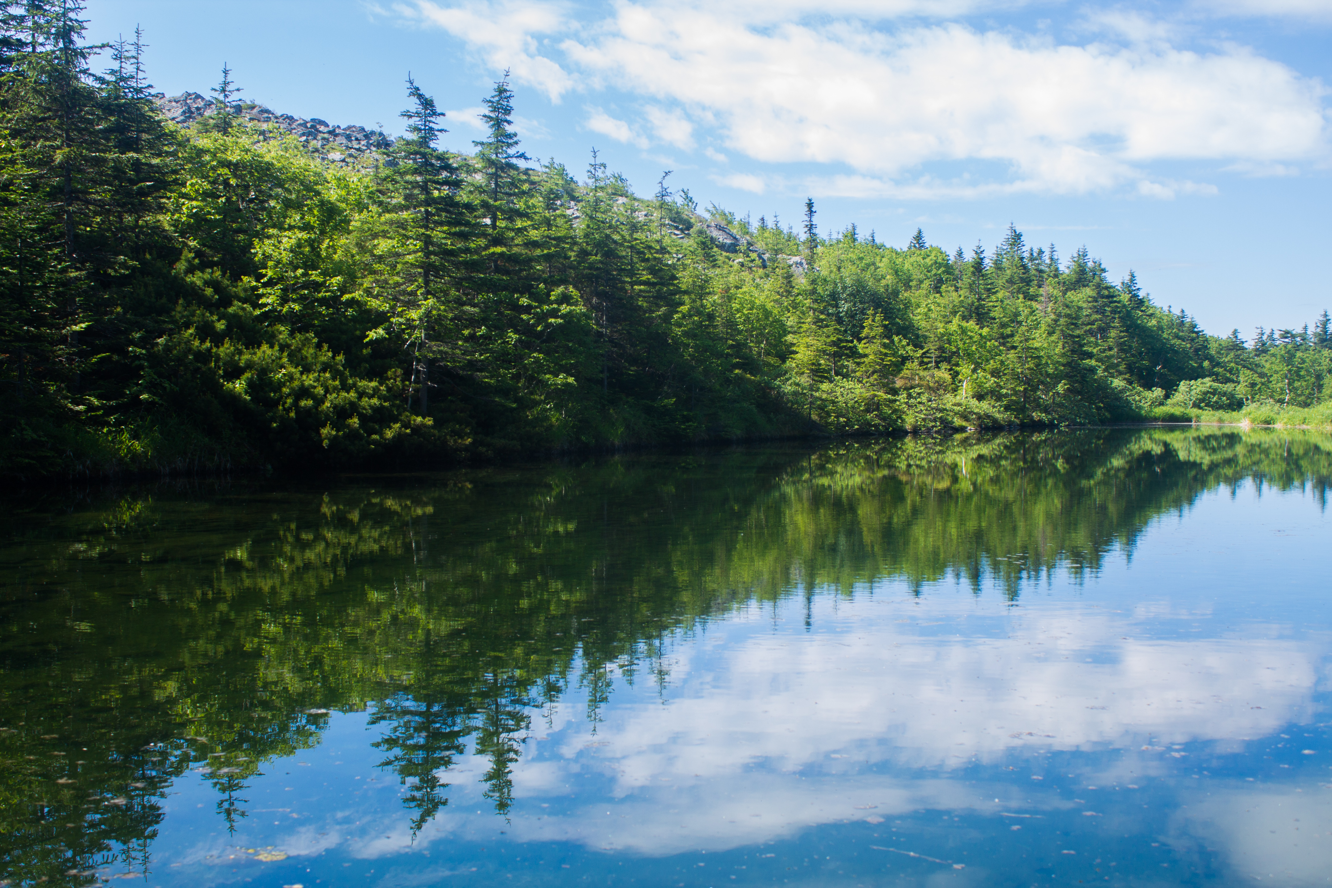 Озеро Алексеевское на горе Ольховая (Приморский край)